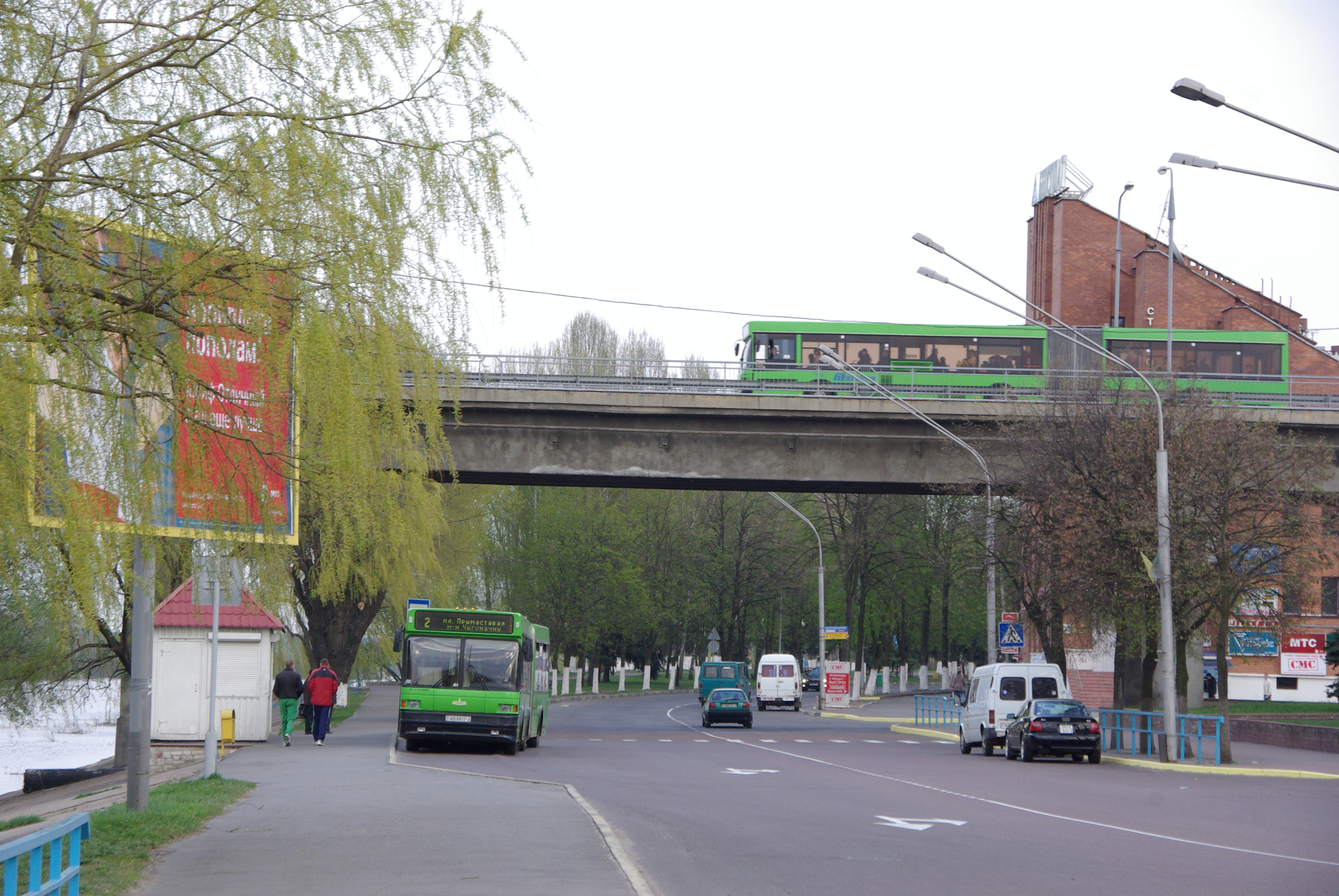 Mozyr tram fantrip. Мозырь - Mazyr, Belarus